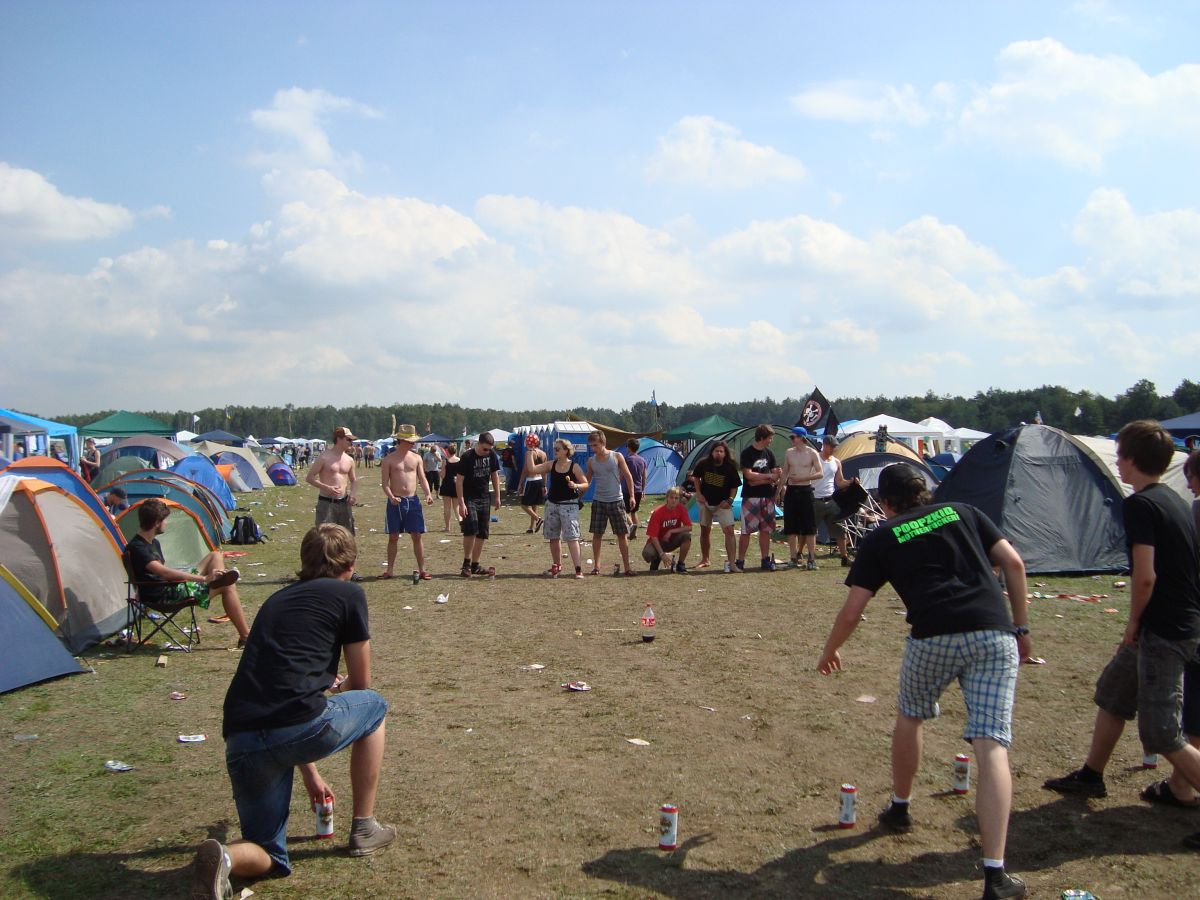 Flunkyball auf dem Area 4.